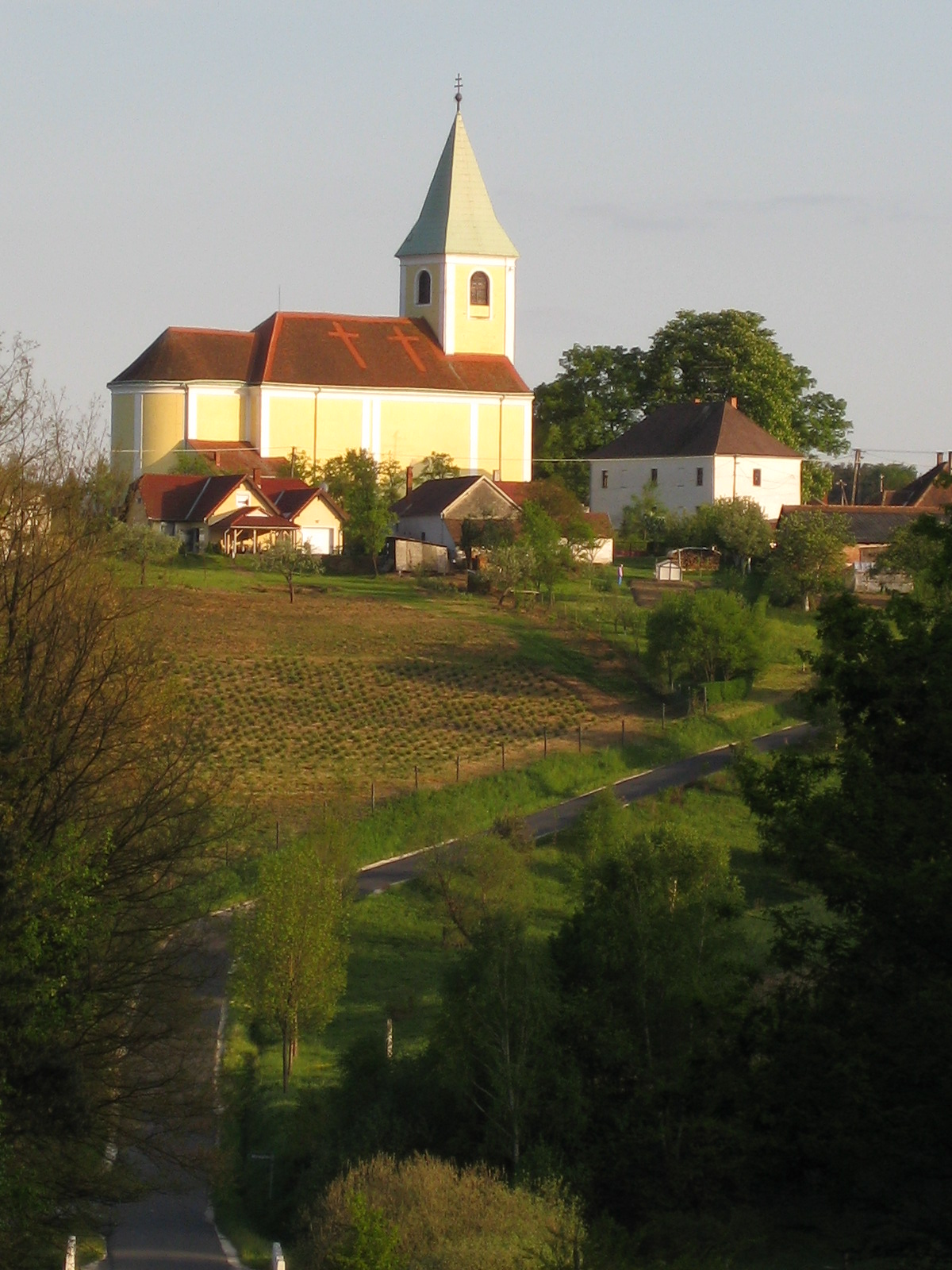 Števanovci (slovenian name), village in Hungary